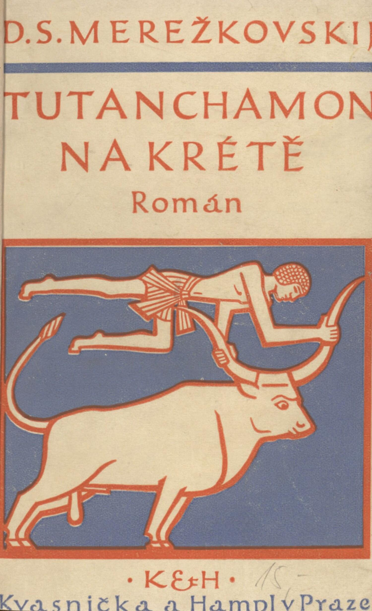 Vratislav Hugo Brunner, obálka Tutanchamon na Krétě